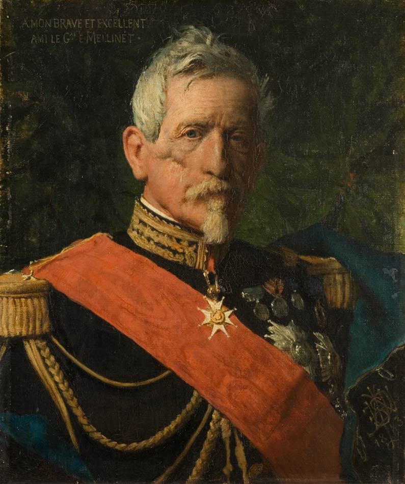 Portrait du Général Mellinet Delaunay exécuta deux portraits du Général Emile Mellinet (1798-1894), dont l’un est conservé au Musée Dobrée. Mellinet fit une carrière exemplaire, menant des actions d’éclat à la guerre d’Espagne (1822), en Algérie (1840-1846), en Crimée (1855), et en Italie (1860). Il devint général de brigade en 1850 et général de division en 1855, puis commandant supérieur des grades nationales de la Seine (1863) avant de démissionner en 1869. Il reçut la Grand Croix de la Légion d’Honneur en 1859 et devint Sénateur en 1865. Grand Maître de la Franc-maçonnerie de France (1865-1870), Mellinet fut aussi collectionneur averti. Dans son portrait, Delaunay rend un hommage puissant au caractère hors norme de son modèle, son ami, ne cachant ni la cicatrice reçue à Sébastopol, ni les décorations militaires. L’œuvre fut léguée au musée de Nantes par Mellinet, en 1894. Sa ville natale lui consacra à sa mort une place ornée d’une sculpture de Gustave Leblanc-Barbedienne (1898).